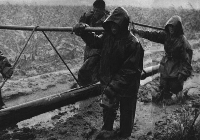 1966-07 1966年大庆油田会战